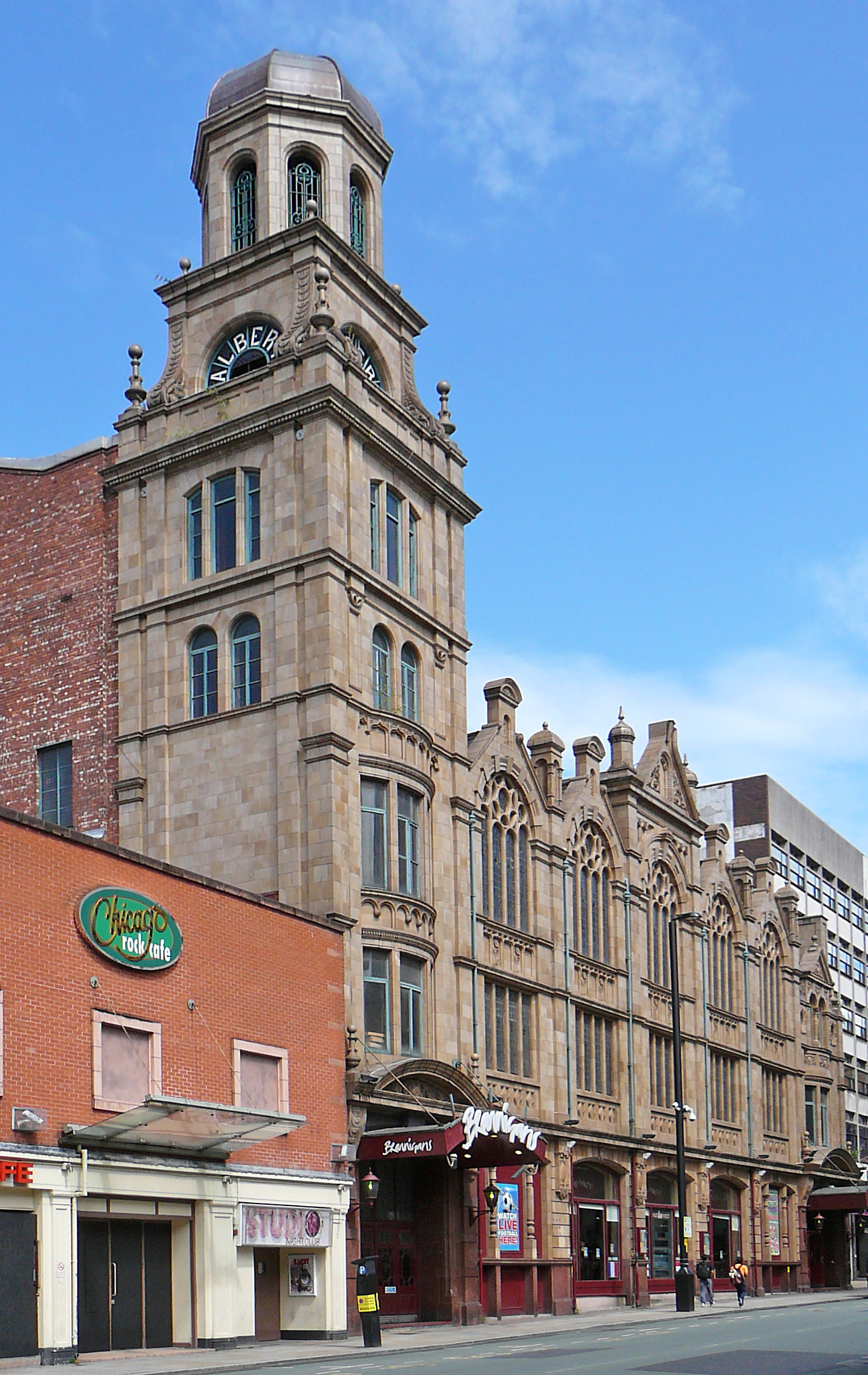 Albert Hall (Manchester)